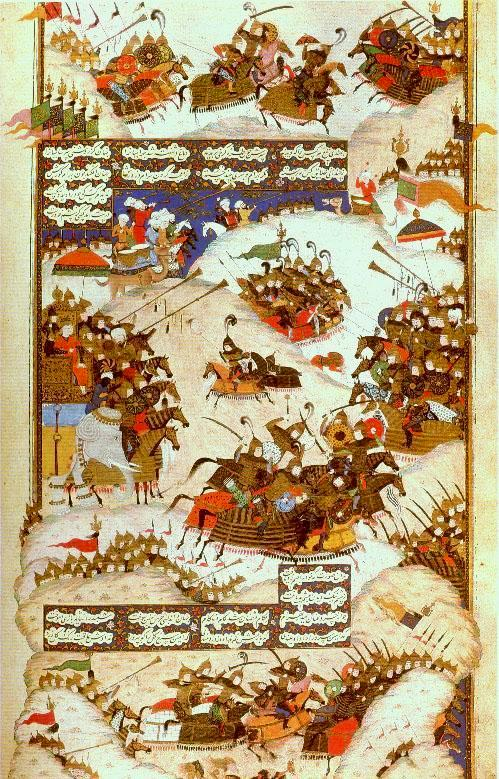 Darvish_Muhammad_Дервиш Мухаммад. Битва Хосрова и Бахрама Чубина. "Хамсе" Низами. 1480е гг. Топкапы Сарай, Стамбул.